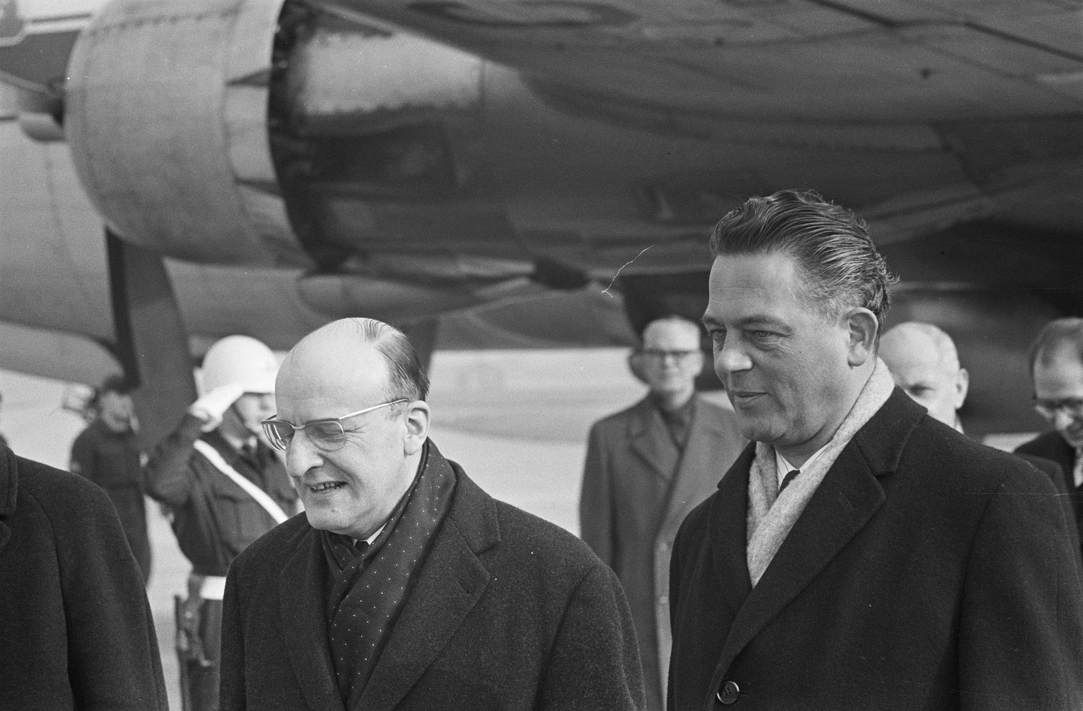 Collectie / Archief : Fotocollectie Anefo Reportage / Serie : [ onbekend ] Beschrijving : Belgische premier bij minister Marijnen op bezoek, minister Marijnen haalde minister Lefevre af op vliegveld Ypenburg Datum : 15 februari 1964 Locatie : Den Haag, Ypenburg, Zuid-Holland Trefwoorden : bezoeken, premiers, vliegvelden Persoonsnaam : Lefèvre, Theodore, Marijnen, Victor Fotograaf : Koch, Eric / Anefo Auteursrechthebbende : Nationaal Archief Materiaalsoort : Negatief (zwart/wit) Nummer archiefinventaris : bekijk toegang 2.24.01.05 Bestanddeelnummer : 916-0548